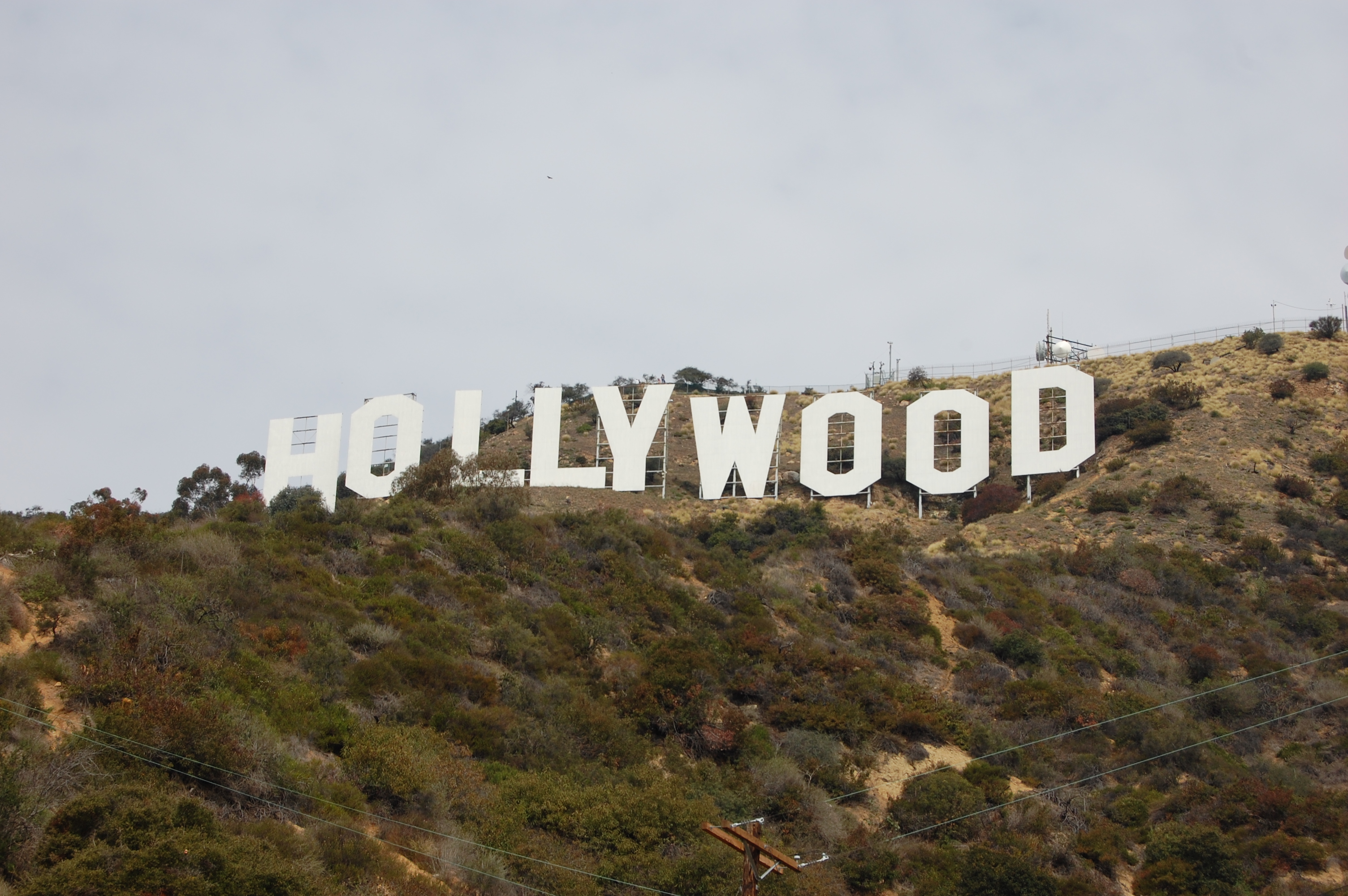 Знак Голливуд Sign Hollywood.